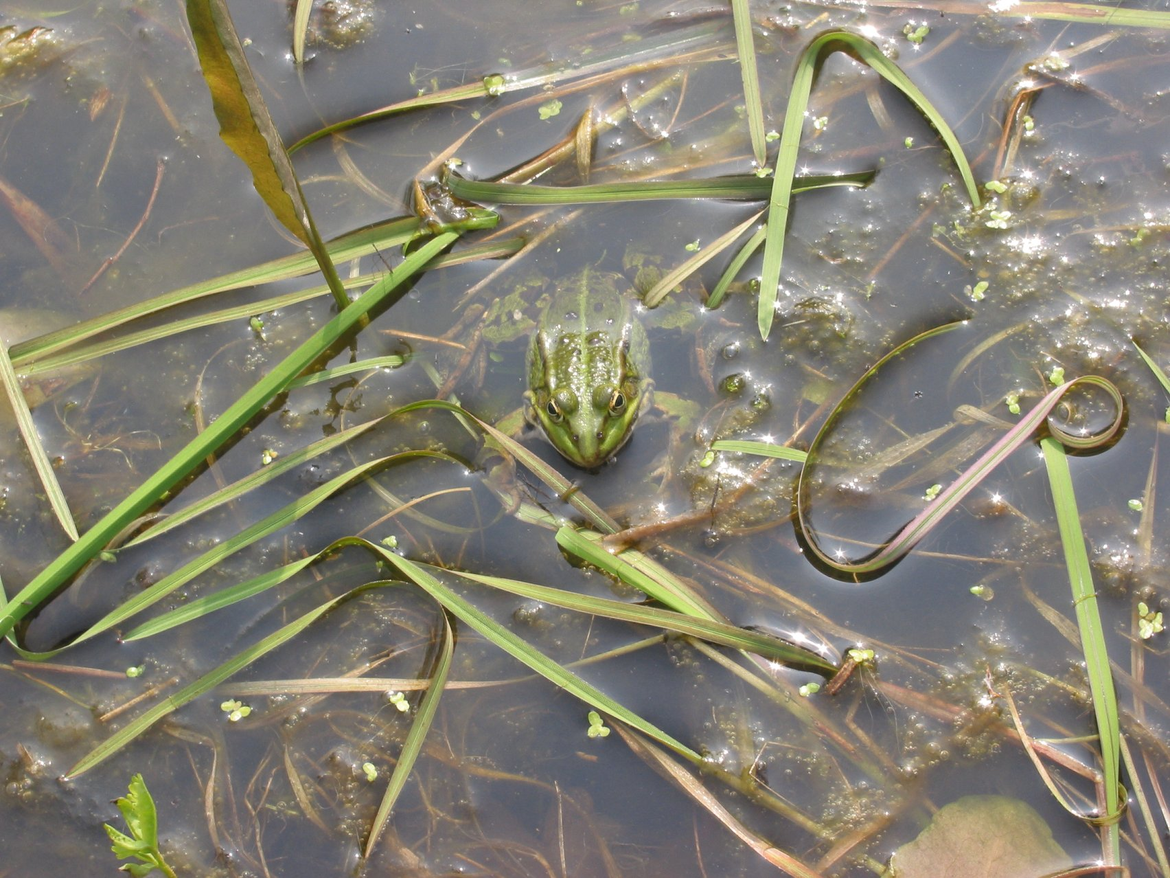 (nl: Kleine groene kikker (Rana lessonae) bij fijne waterranonkel) Rana lessonae